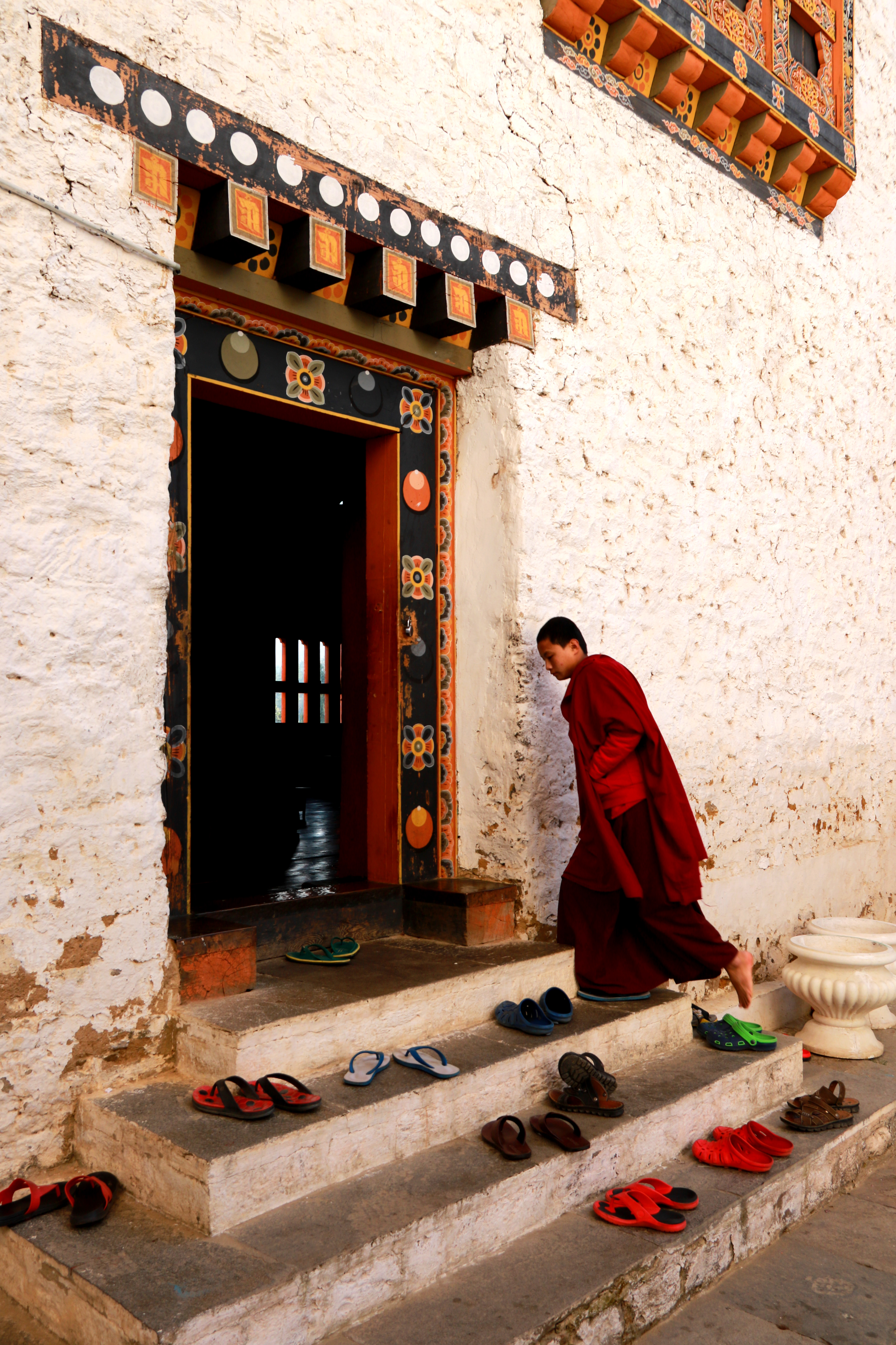 Bouthan, monastere